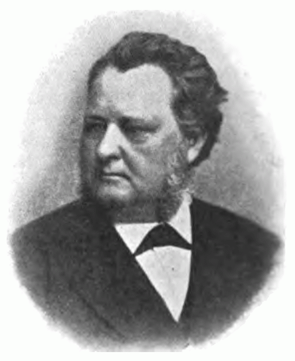 Heinrich von Ranke (1830-1909), German physician